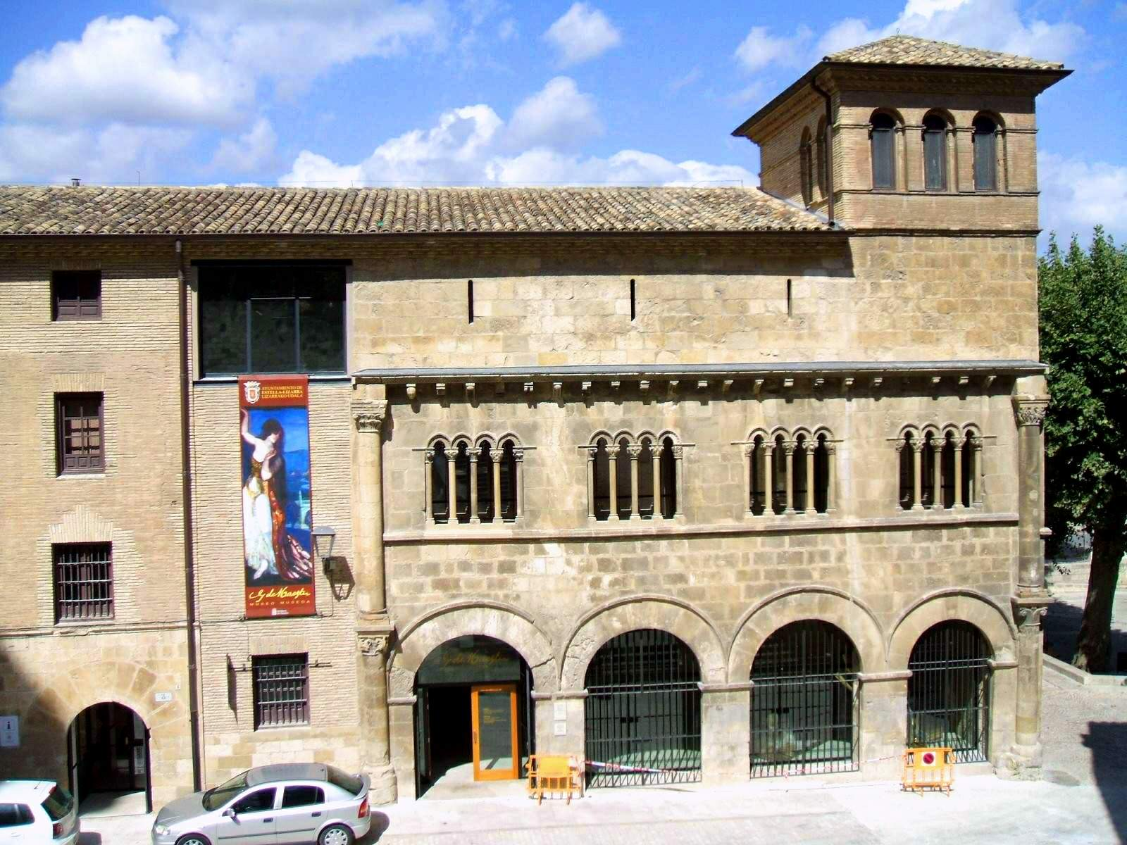 Palacio de los Reyes de Navarra, Estella (Navarra)